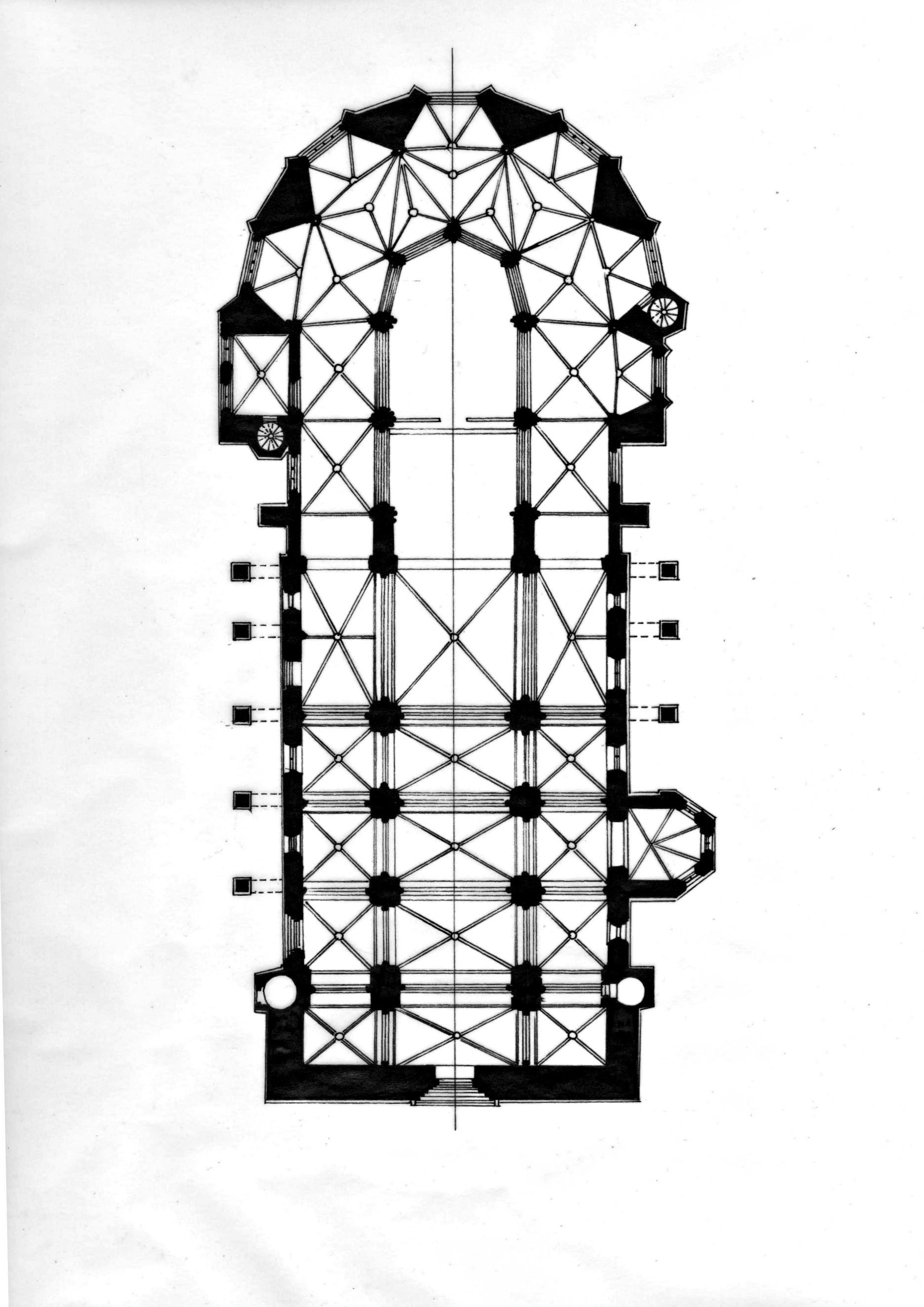 Костёл Святого Варфоломея в Колине